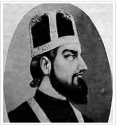 Poet Muhammad Ibrahim Zauq